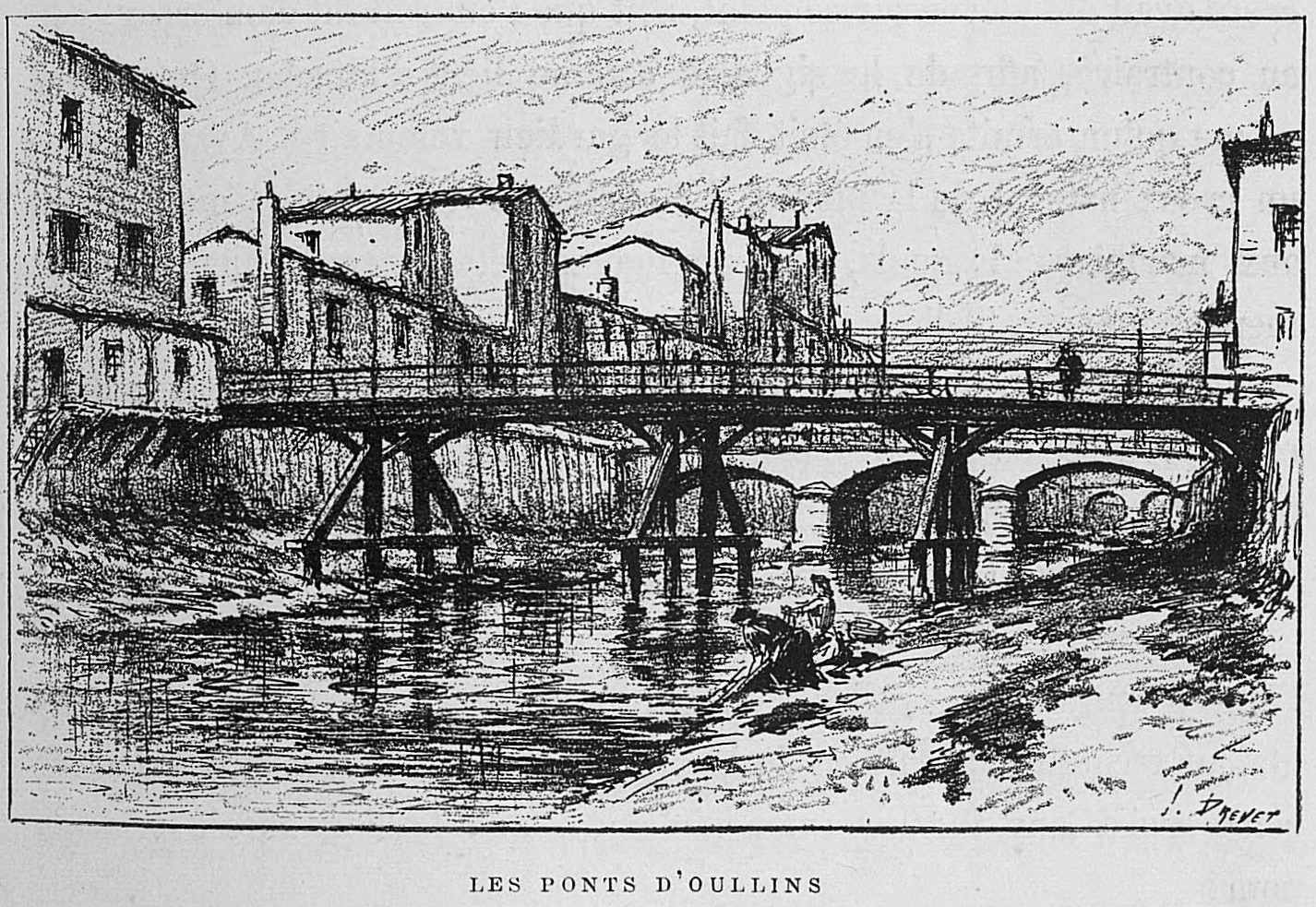 Aux environs de Lyon / Monsieur Josse ; préface de M. Coste-Labaume ; édition illustrée de 250 dessins de J. Drevet.